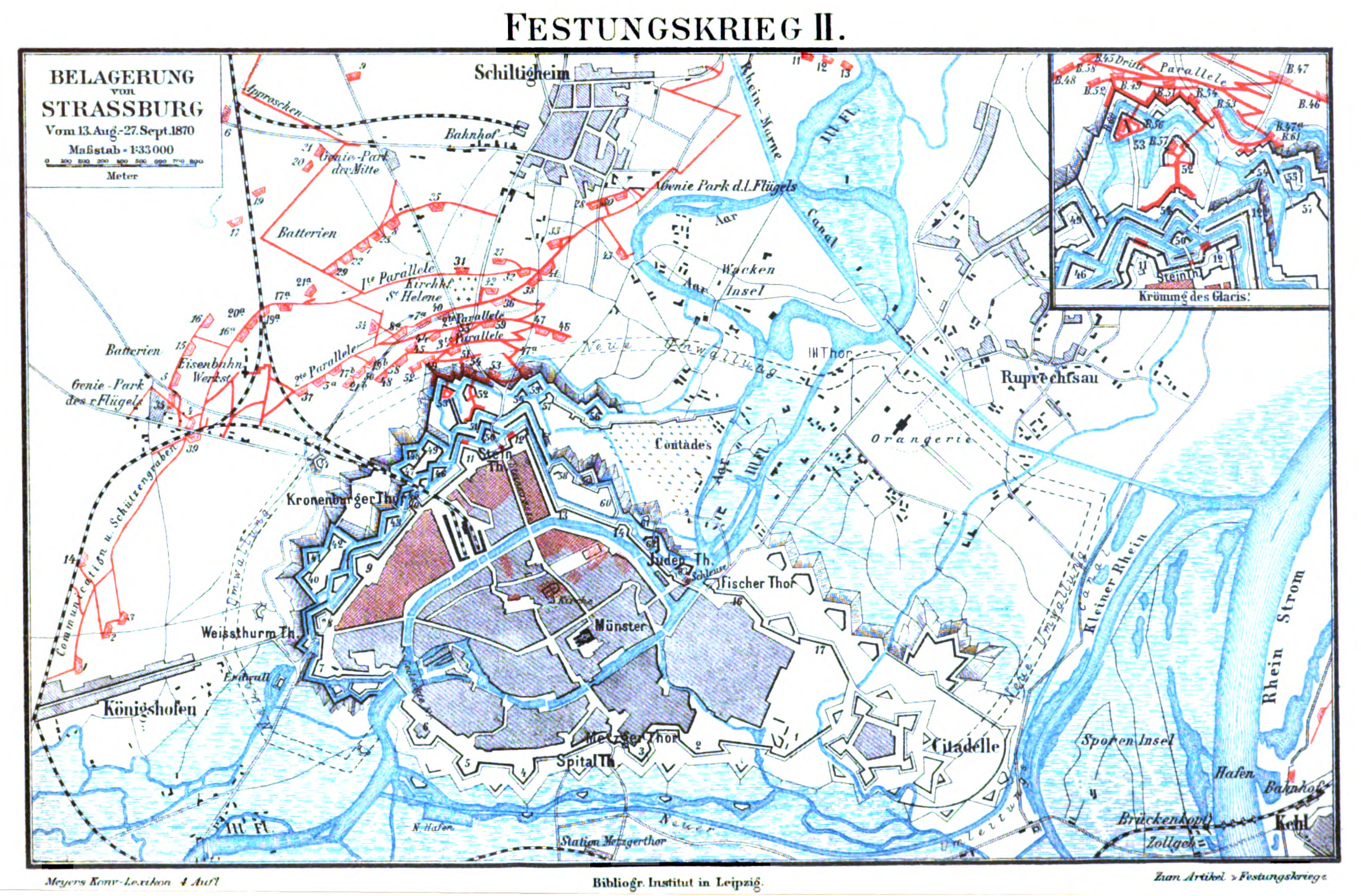 Tafel „Festungskrieg II“, Original-Text: Belagerung von Strassburg. Vom 13. Aug. – 27. Sept. 1870. Maßstab 1 : 33 000